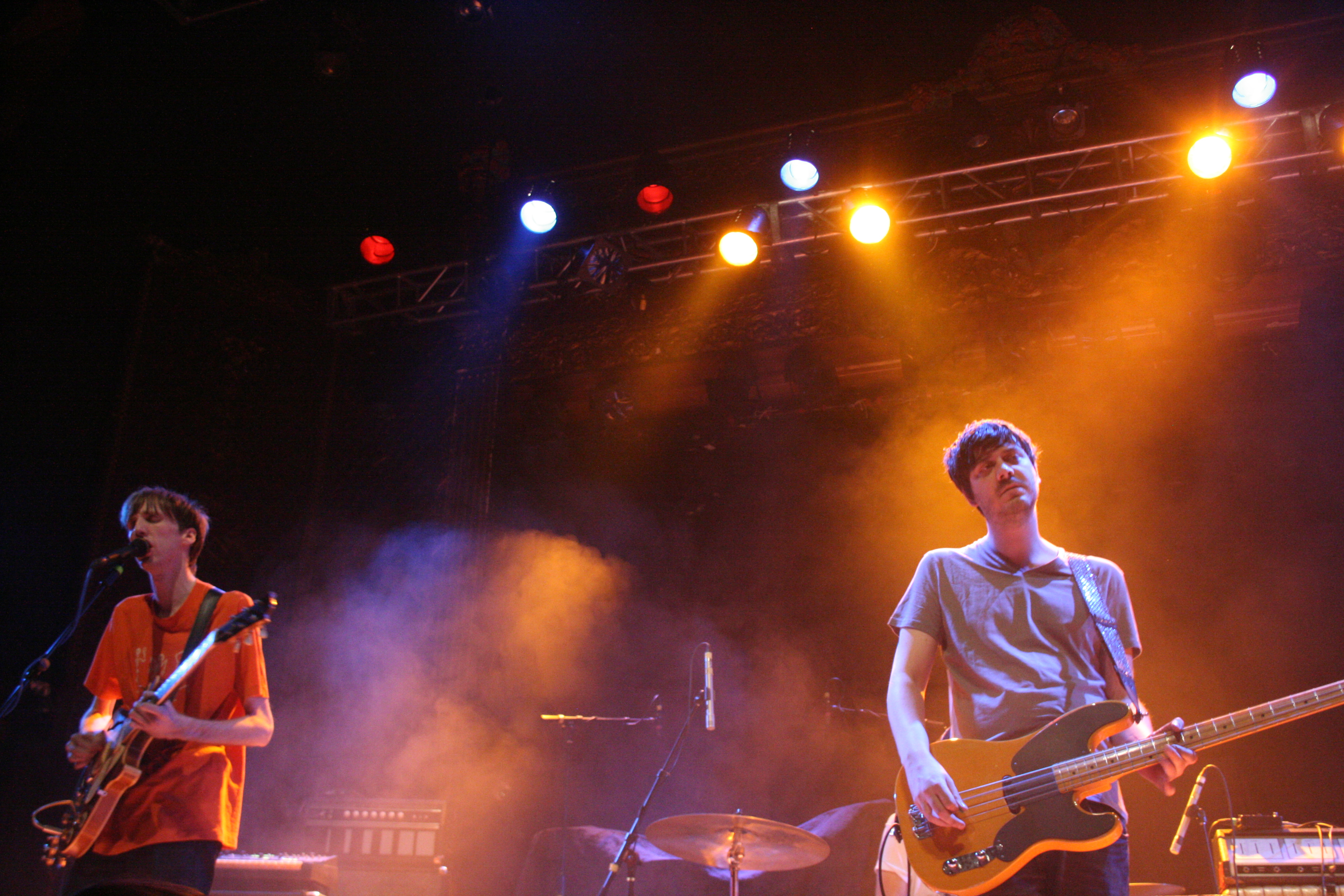 Deerhunter ::: Ogden Theatre :: 04.05.10